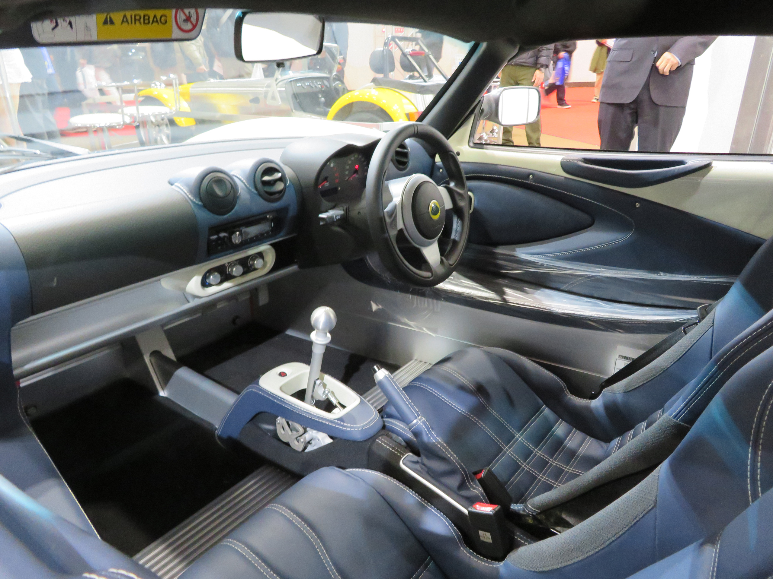 大阪モーターショー2019においてロータス・エリーゼスポーツ220 HERITAGE EDITIONを撮影。